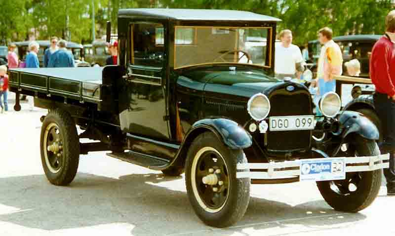 Ford Model AA Truck 1929